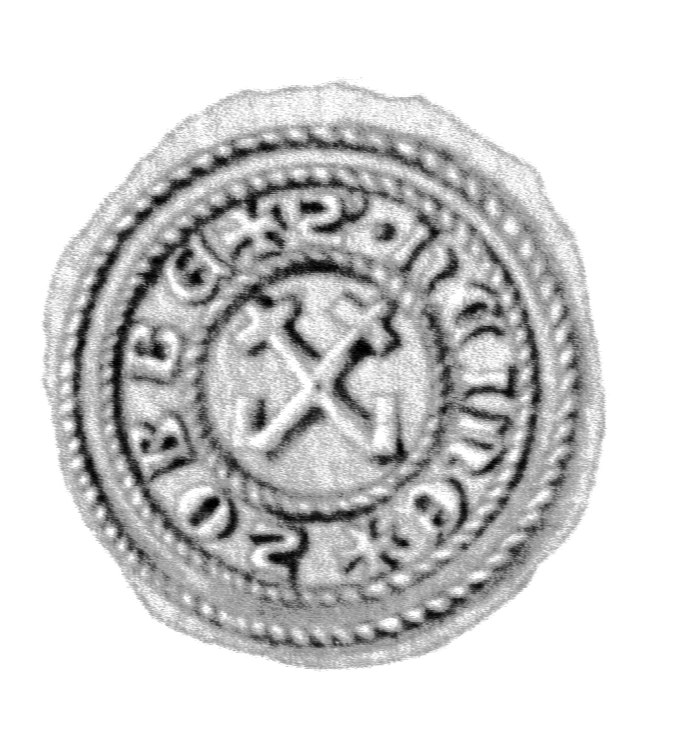 Siegel des Ratsmannes Heyne (Heine) Soppe (Goldschmied, 1416 hingerichtet) . Das Siegel stammt aus der Zeit um 1414. Siehe Emil Ferdinand Fehling: Lübeckische Ratslinie, Nr. 475 (Heyno Sobbe).